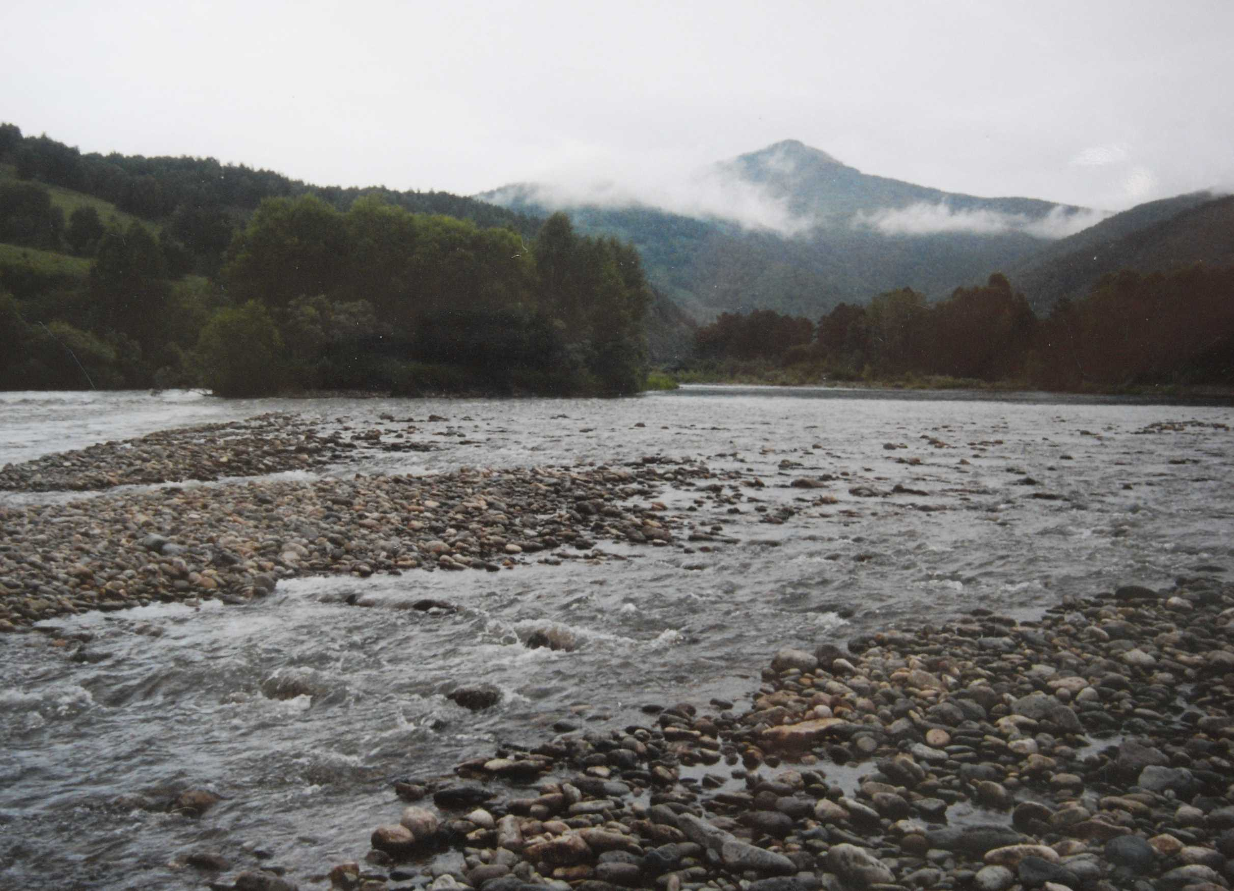 Korgon-Gebirge